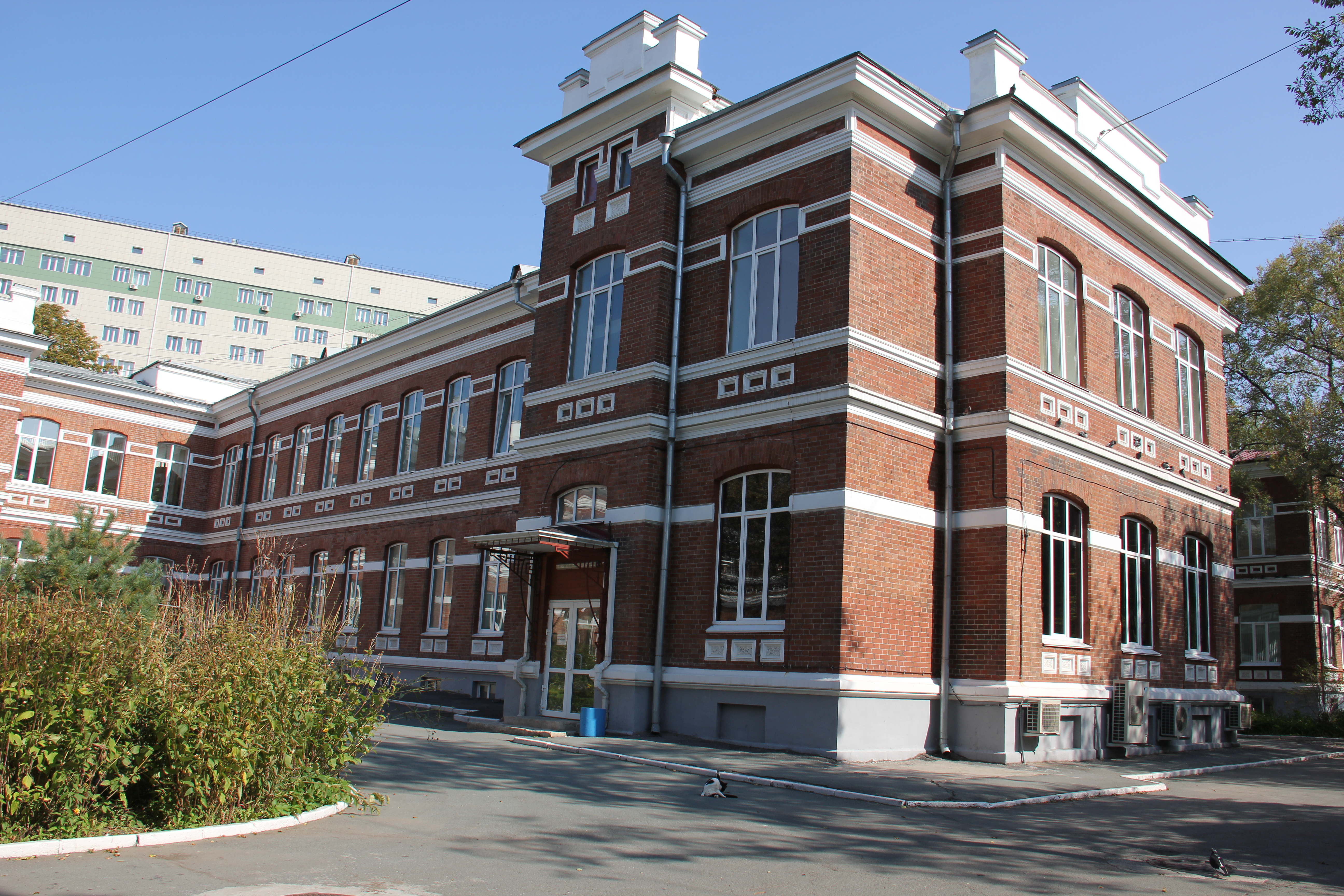 Владивостокская городская больница (Приморский край, Владивосток, Алеутская улица, 57, корпус 1, 2, 3, 4)